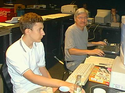 Sergej Karjakin und Dogobert Kohlmeyer im Pressezentrum am Computer, Dortmunder Schachtage 2004.